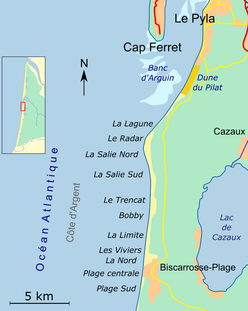 Carte de la côte du Pilat à Biscarrosse (Aquitaine, France)